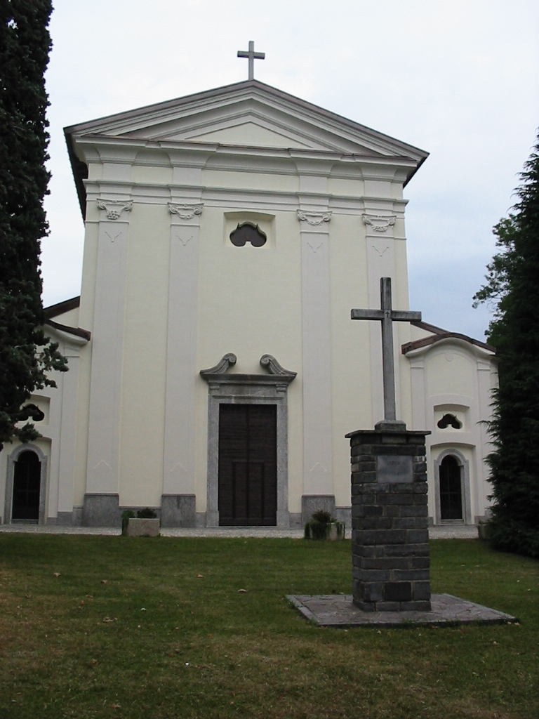 La Chiesa di Somazzo a Uggiate